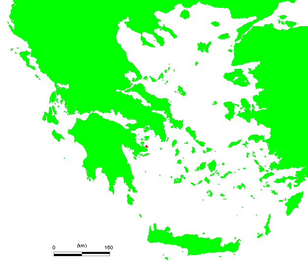 GR Poros.PNG (Greek island)